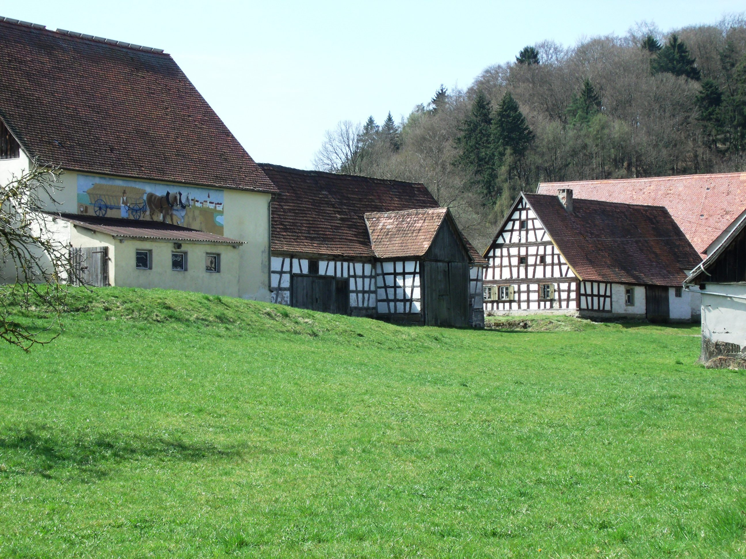 Schwand, Ortsteil von Leutershausen im Landkreis Ansbach